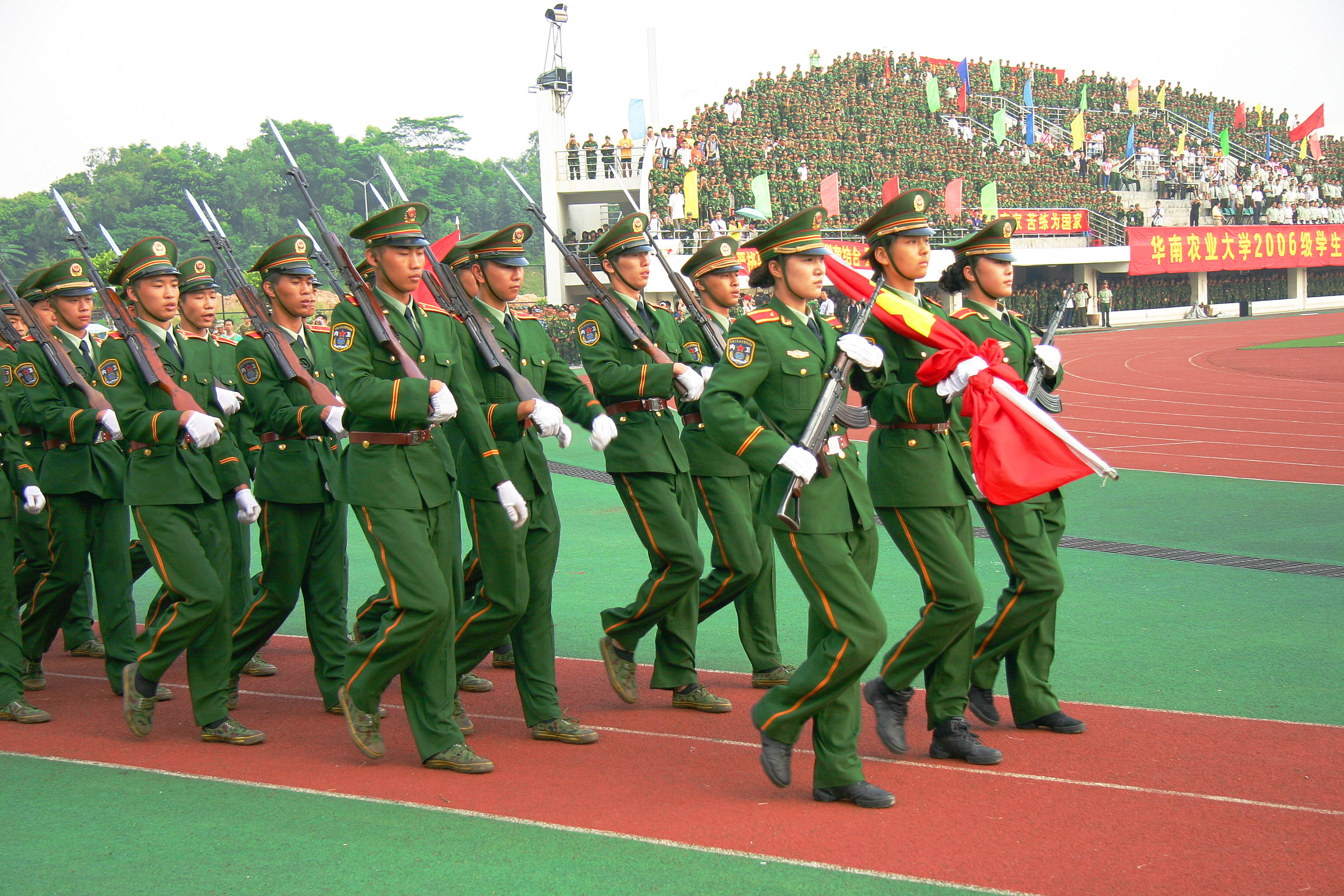 华南农业大学，泰山区运动场，学生军训阅兵